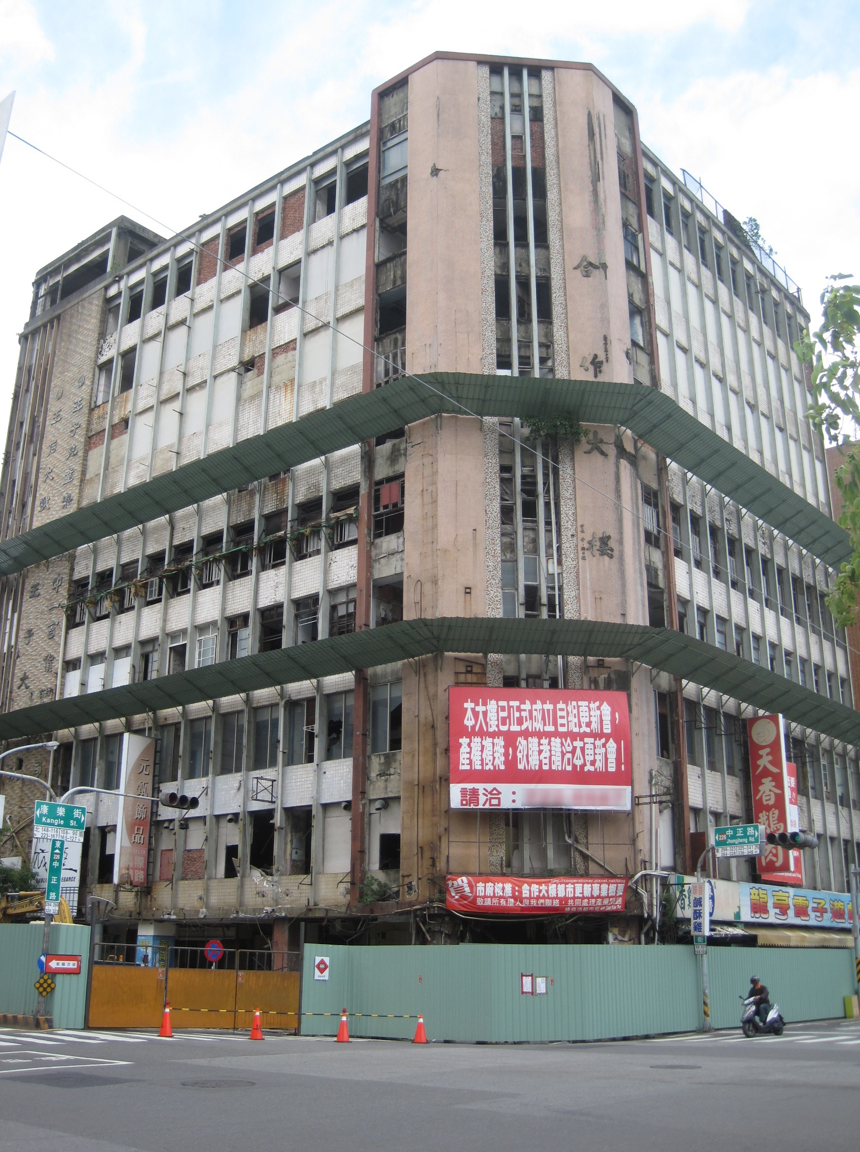 臺南市合作大樓，正在進行拆除工程。